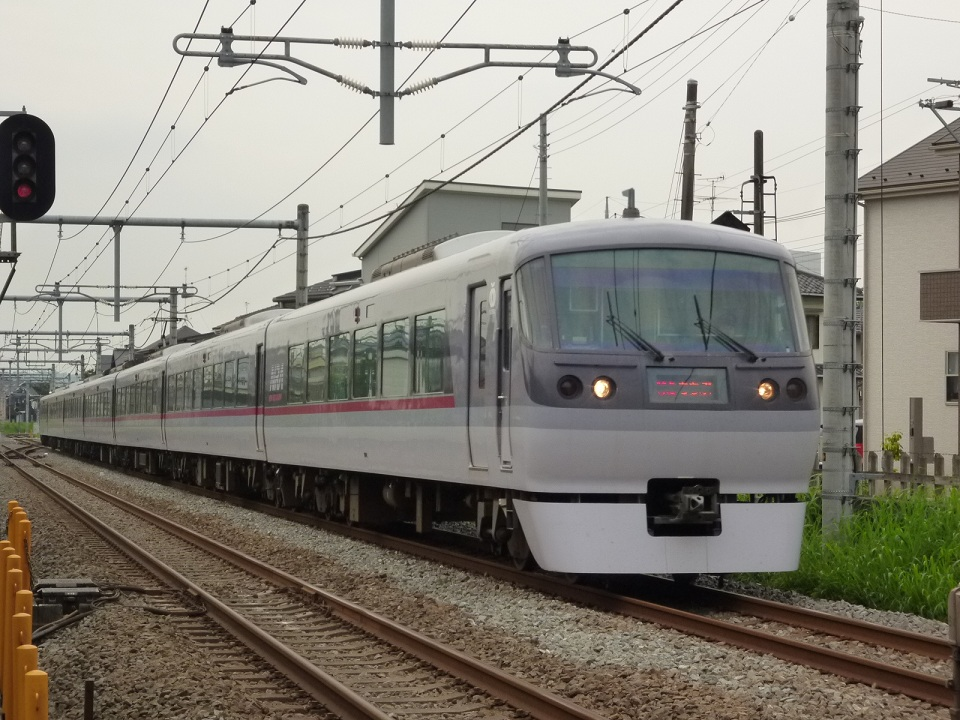 西武鉄道10000系10112編成